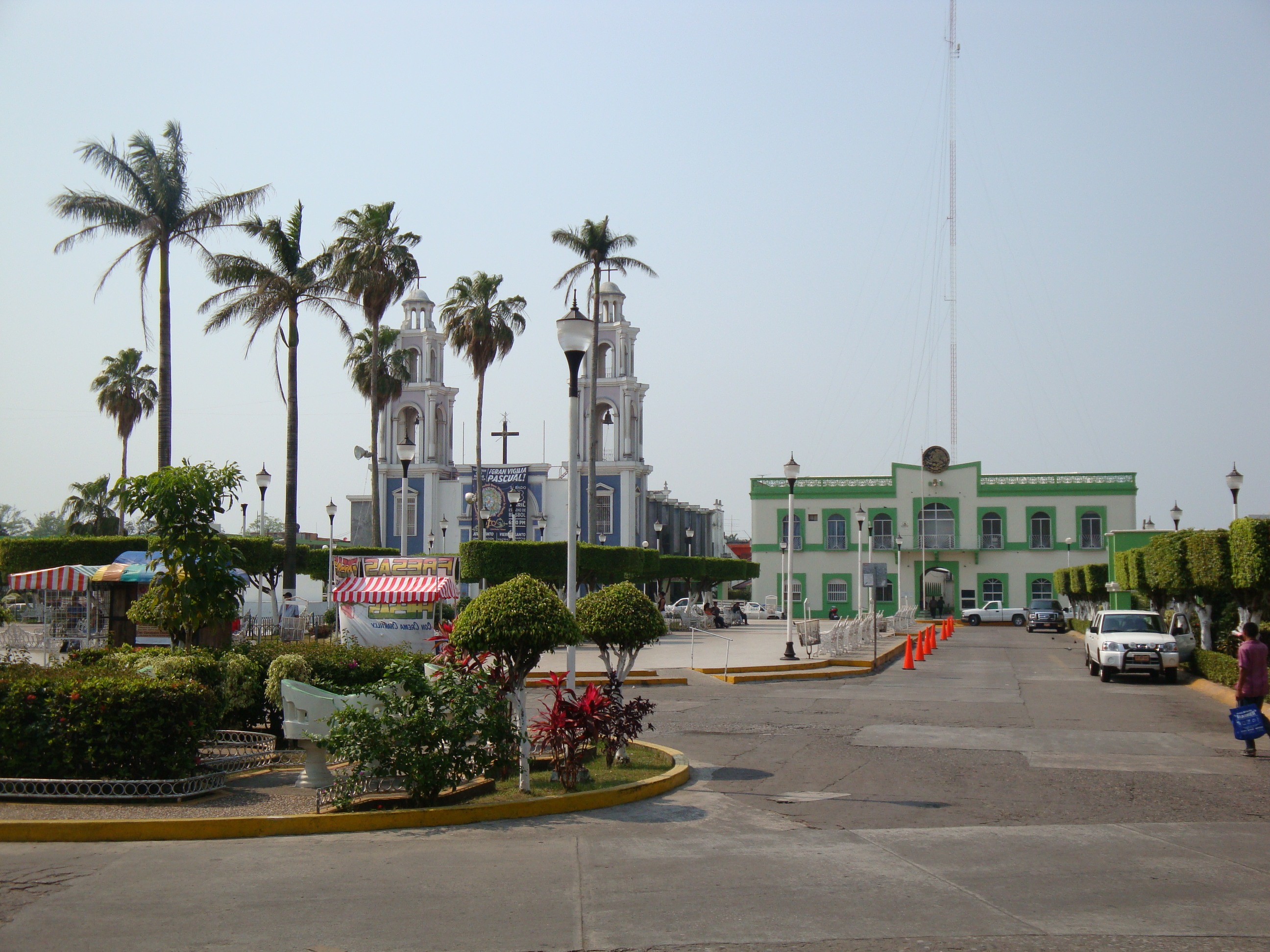 Iglesia y Palacio Municipal, en la ciudad de Comalcalco, Tabasco